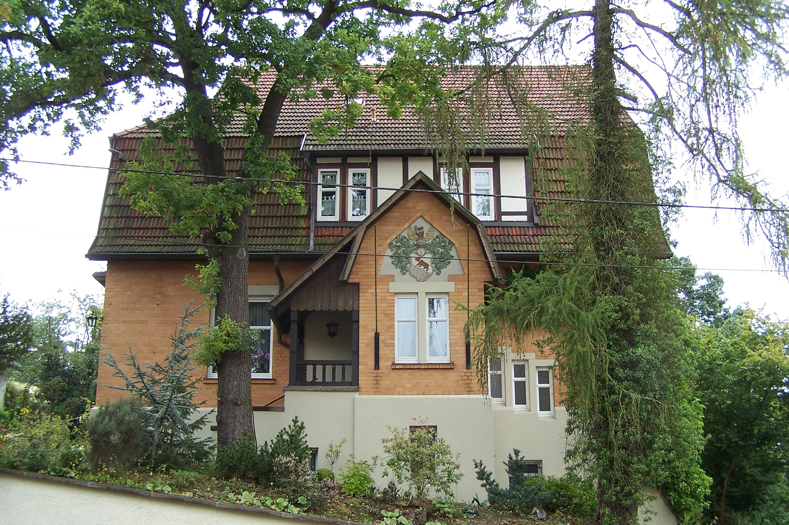 Teilansicht des Hauses im Zentrum der Villenkolonie Karthäuserhöhe in Eisenach.